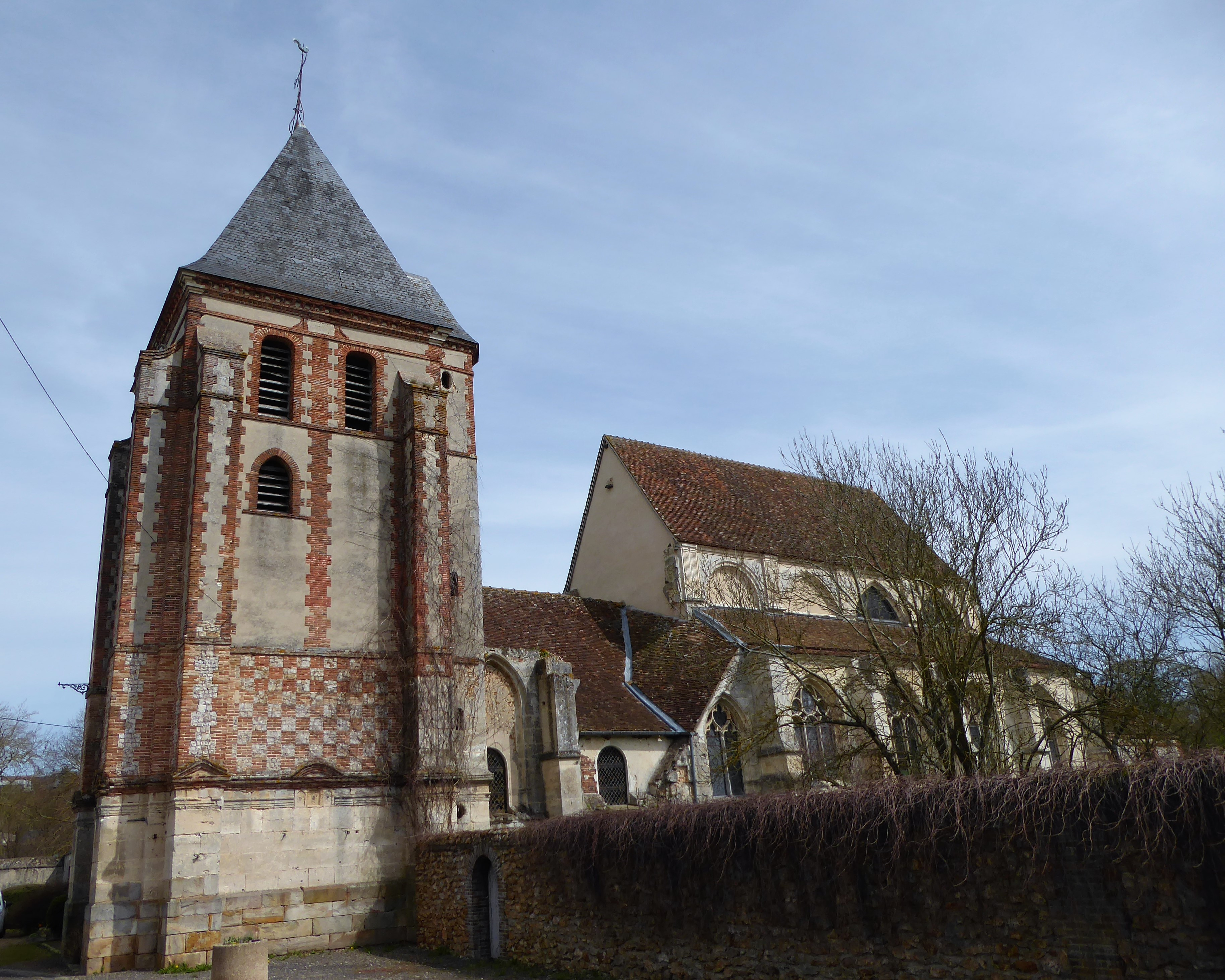 église Saint-Lubin, Saint-Lubin-des-Joncherets, Eure-et-Loir, France.